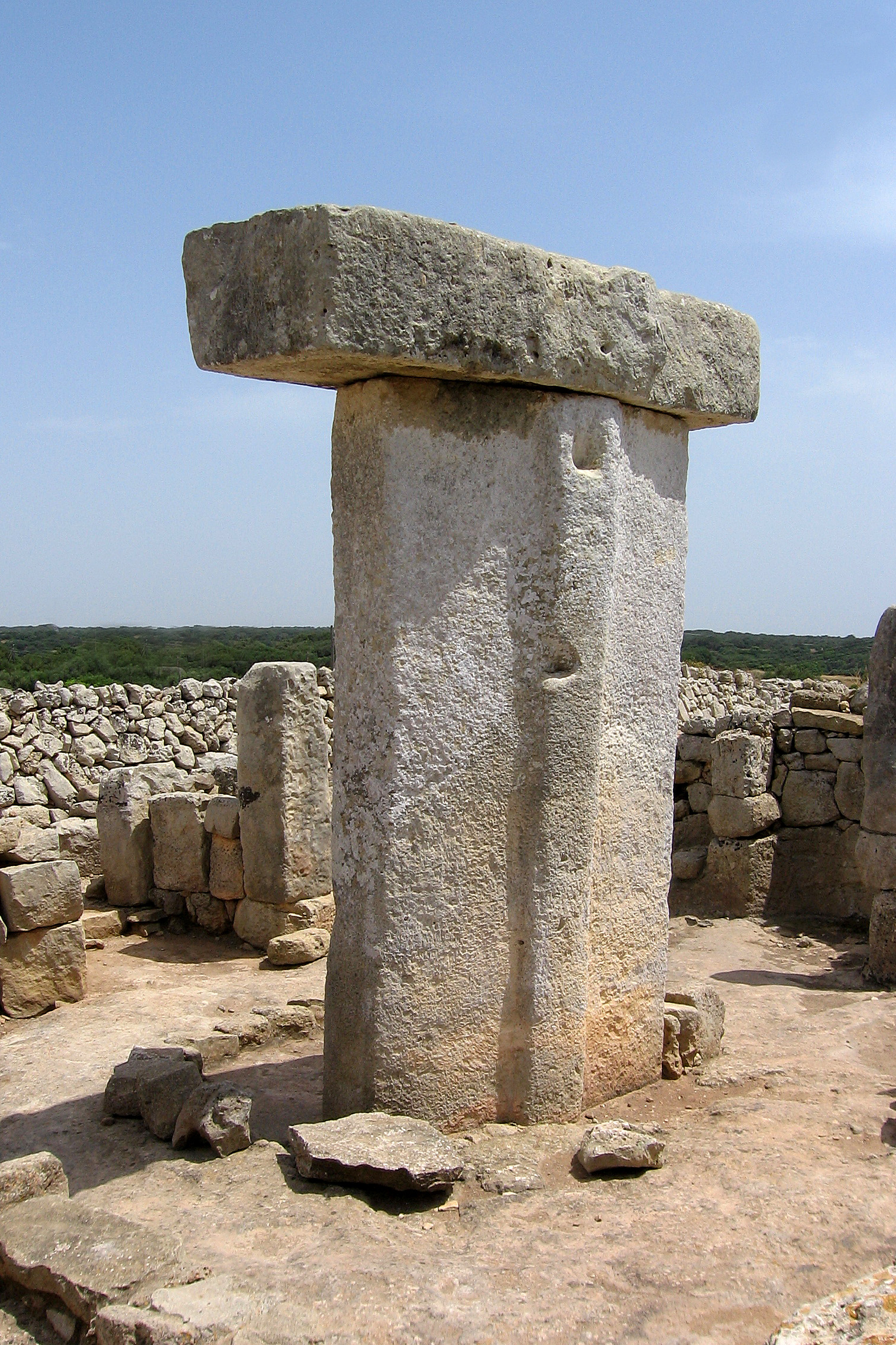 Taula (Torralba d´en Salord, Menorca, Spain)